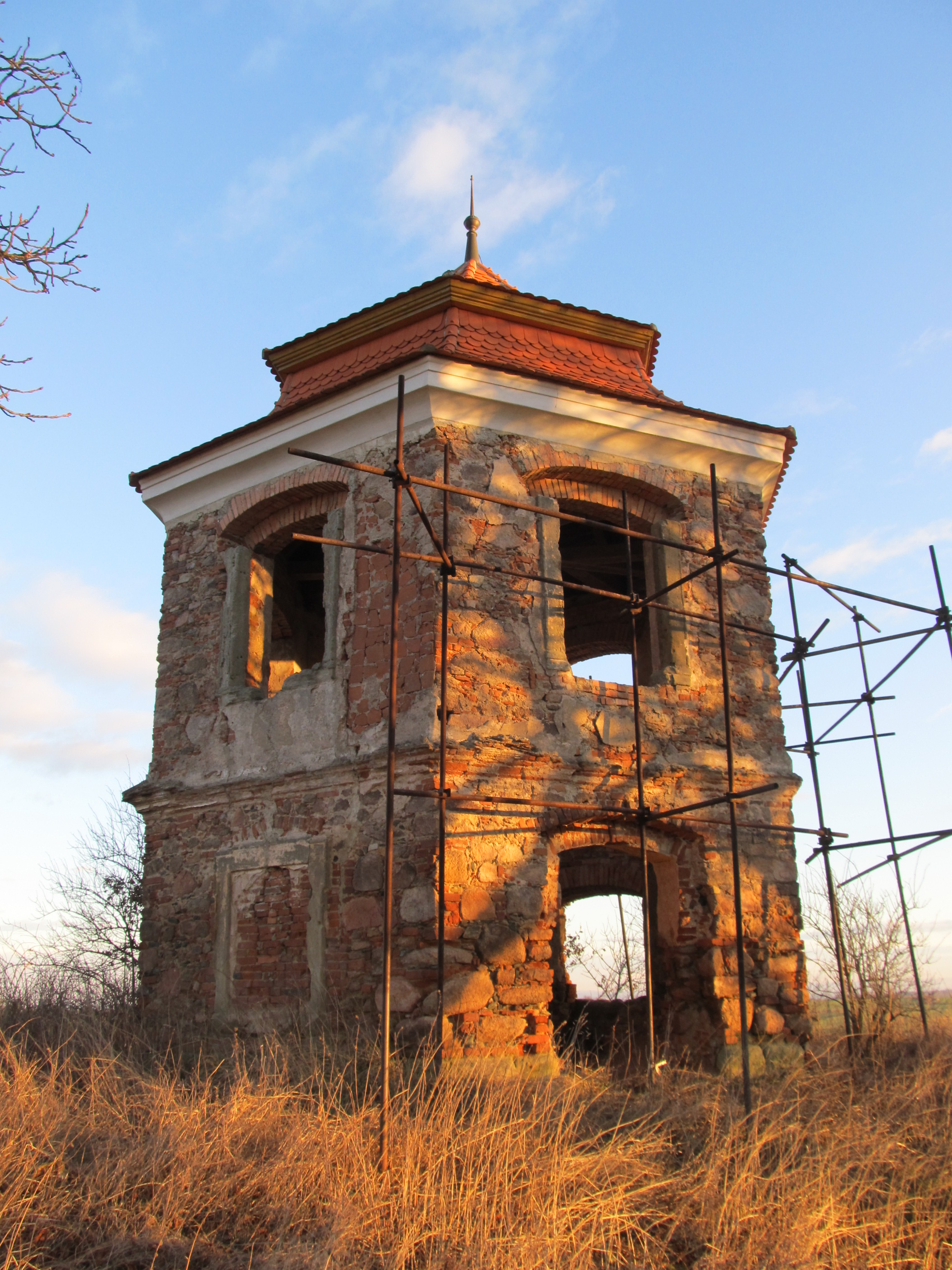 Plavečská kaple